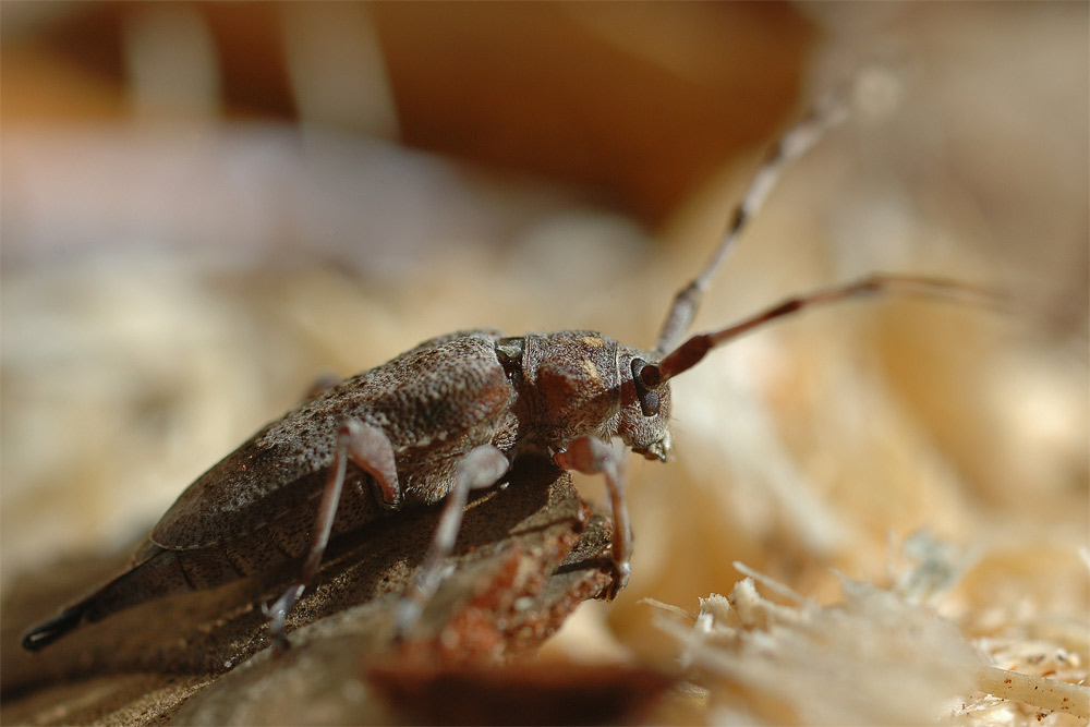 Weiblicher Zimmermannsbock